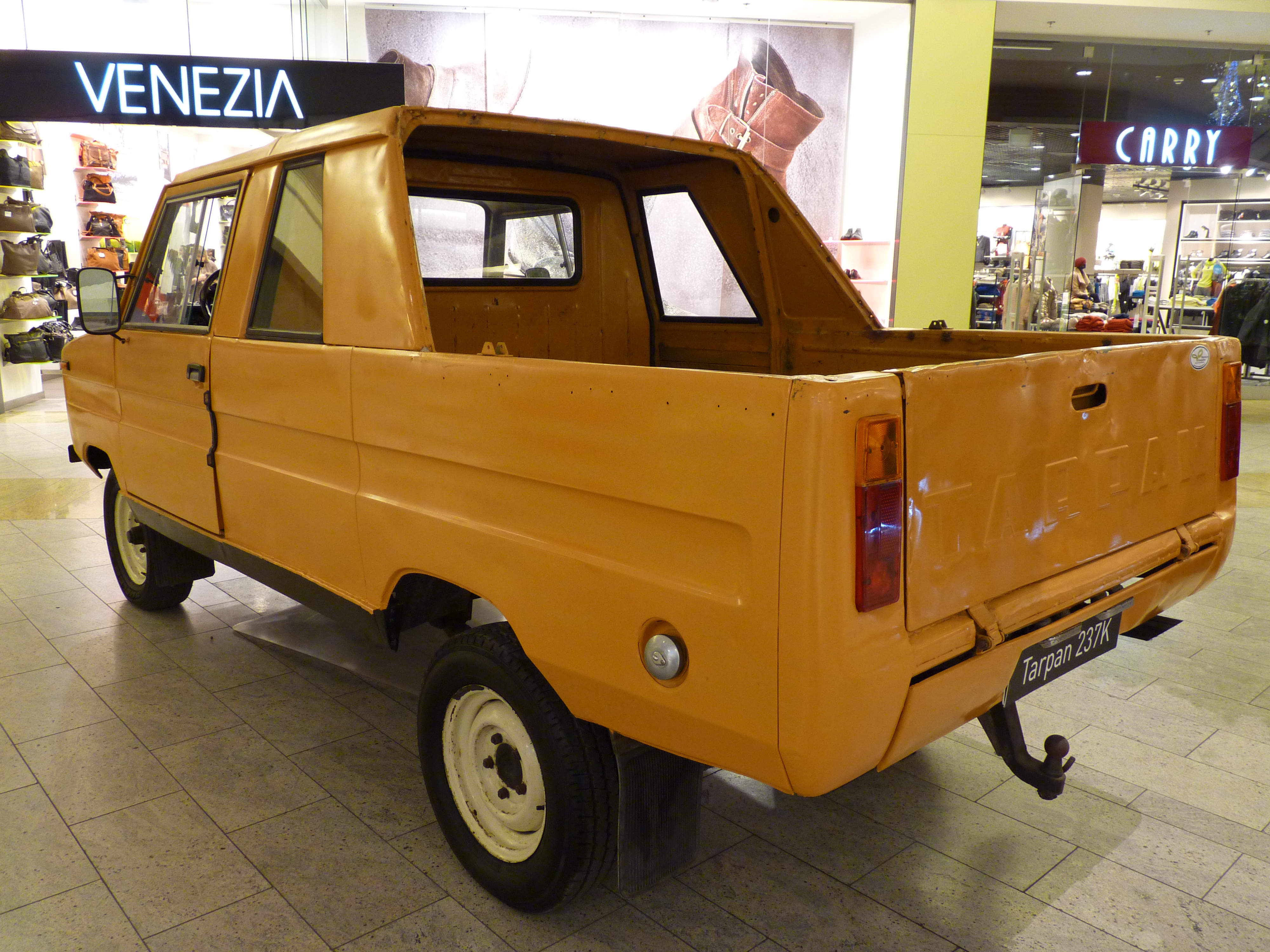 FSR Tarpan 237S during „XXX lat motoryzacji PRL” exhibition at Bonarka City Center in Kraków.